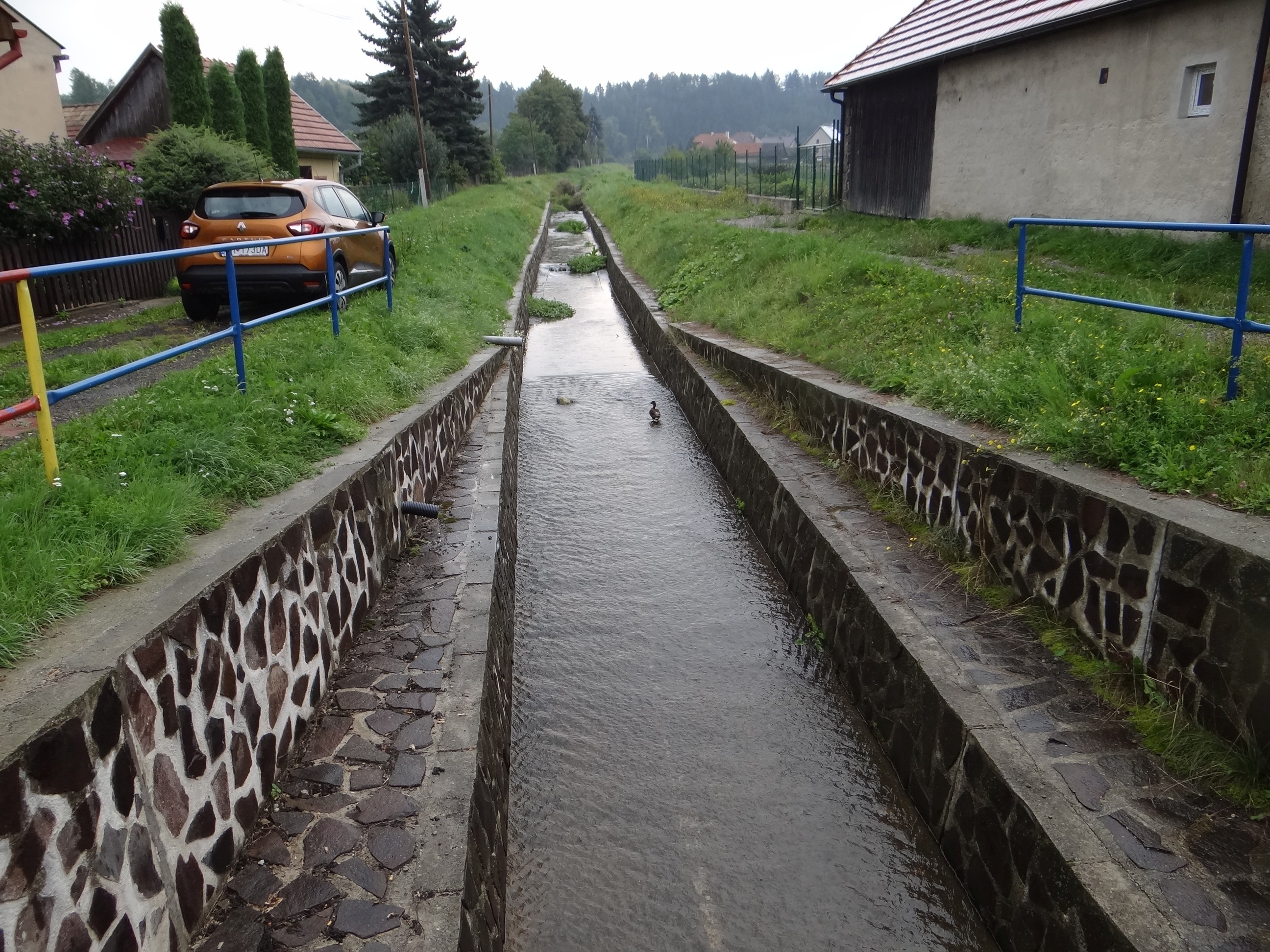 Jamniček in Podtureň